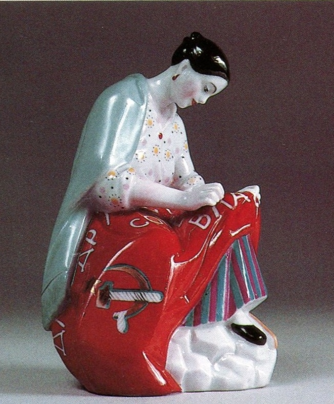 Fahnenstickerin by Natalja Danko